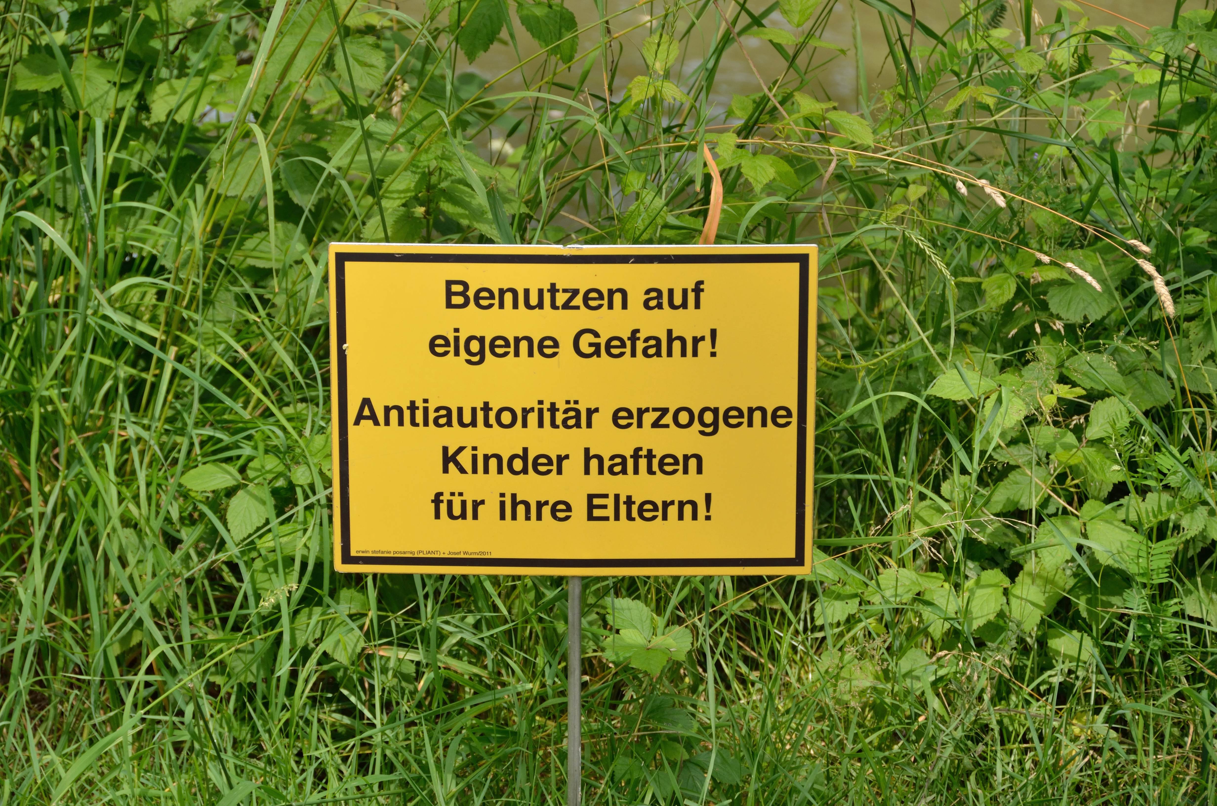 Das Sulmbad Zur Steinernen Wehr ist das älteste Flussbad der Steiermark. Es wurde 1929 errichtet. Website